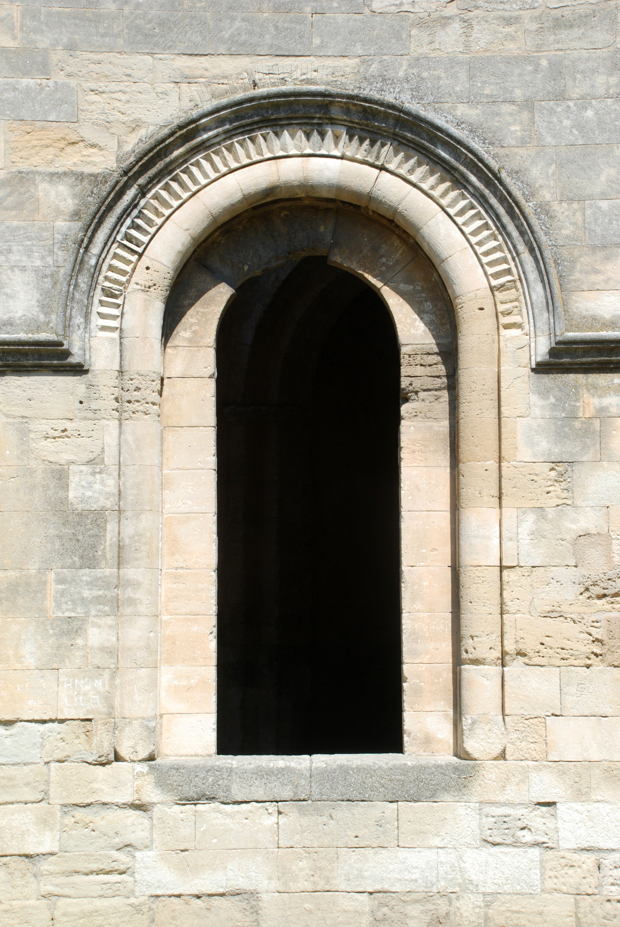 France - Provence - Abbaye de Saint-Ruf d'Avignon